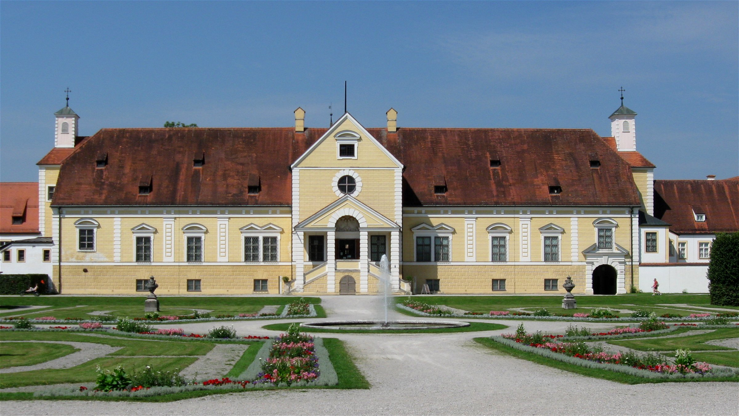 Altes Schloss Schleissheim, Gartenseite (Ostseite)